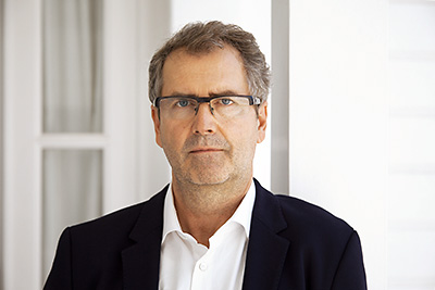 Photo portrait of the German writer, Kurt Drawert